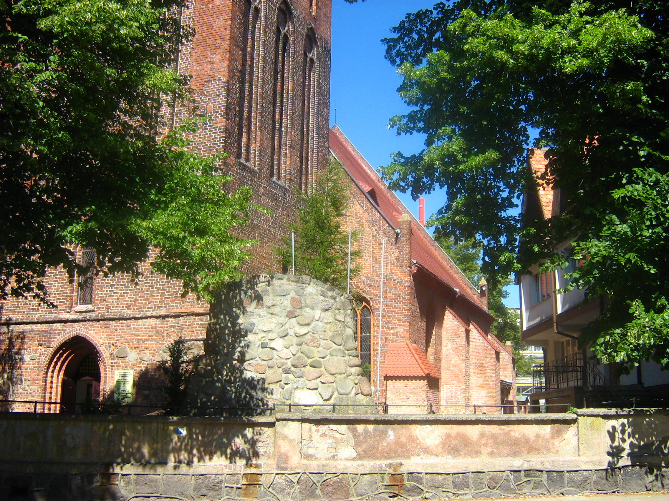 Kościół Wniebowzięcia NMP w Nowogardzie